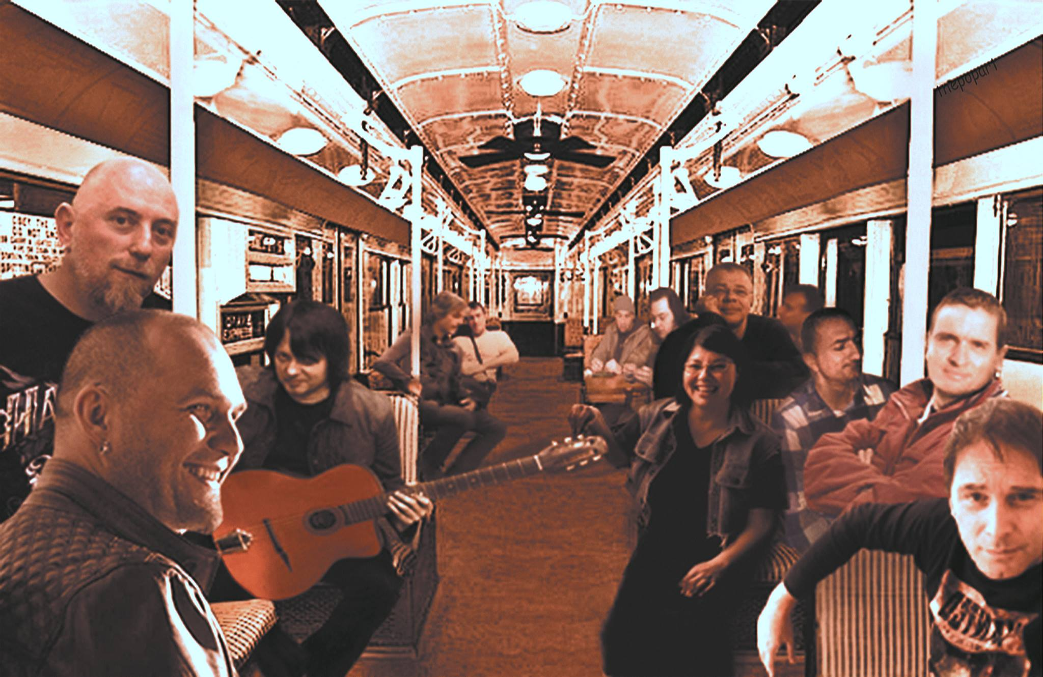 slika rađena za omot albuma "Vozovi"